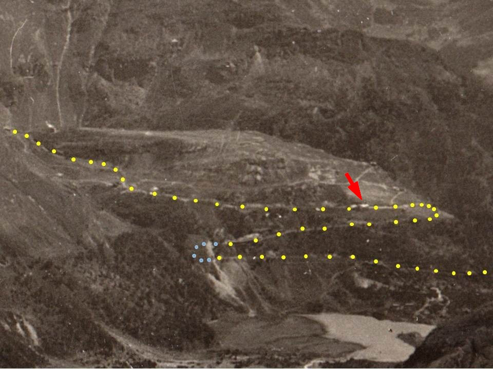 Alp Grüm aus der Luft mit Stationsgebäude (rot), Wendekurve (gelb, rechts im Bild) und Palü-Kehrtunnel (hellblau). Aufnahme aus den dreissiger Jahren.